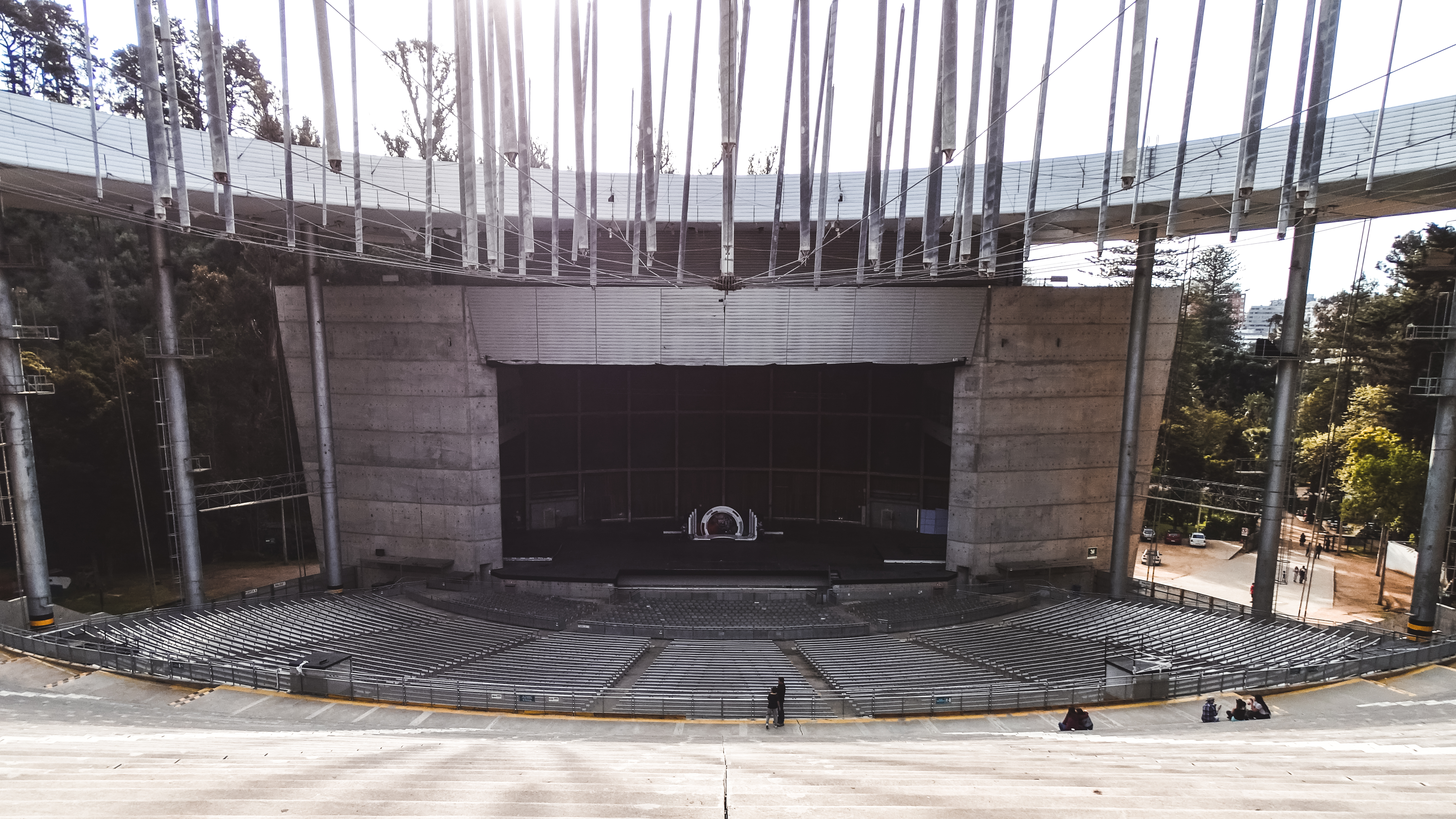 Anfiteatro de la Quinta Vergara en 2017